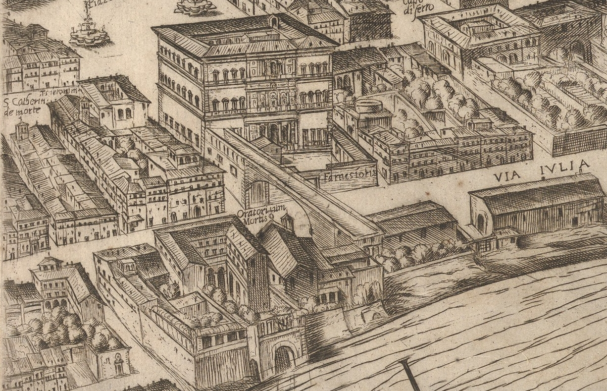 Pianta di Tempesta